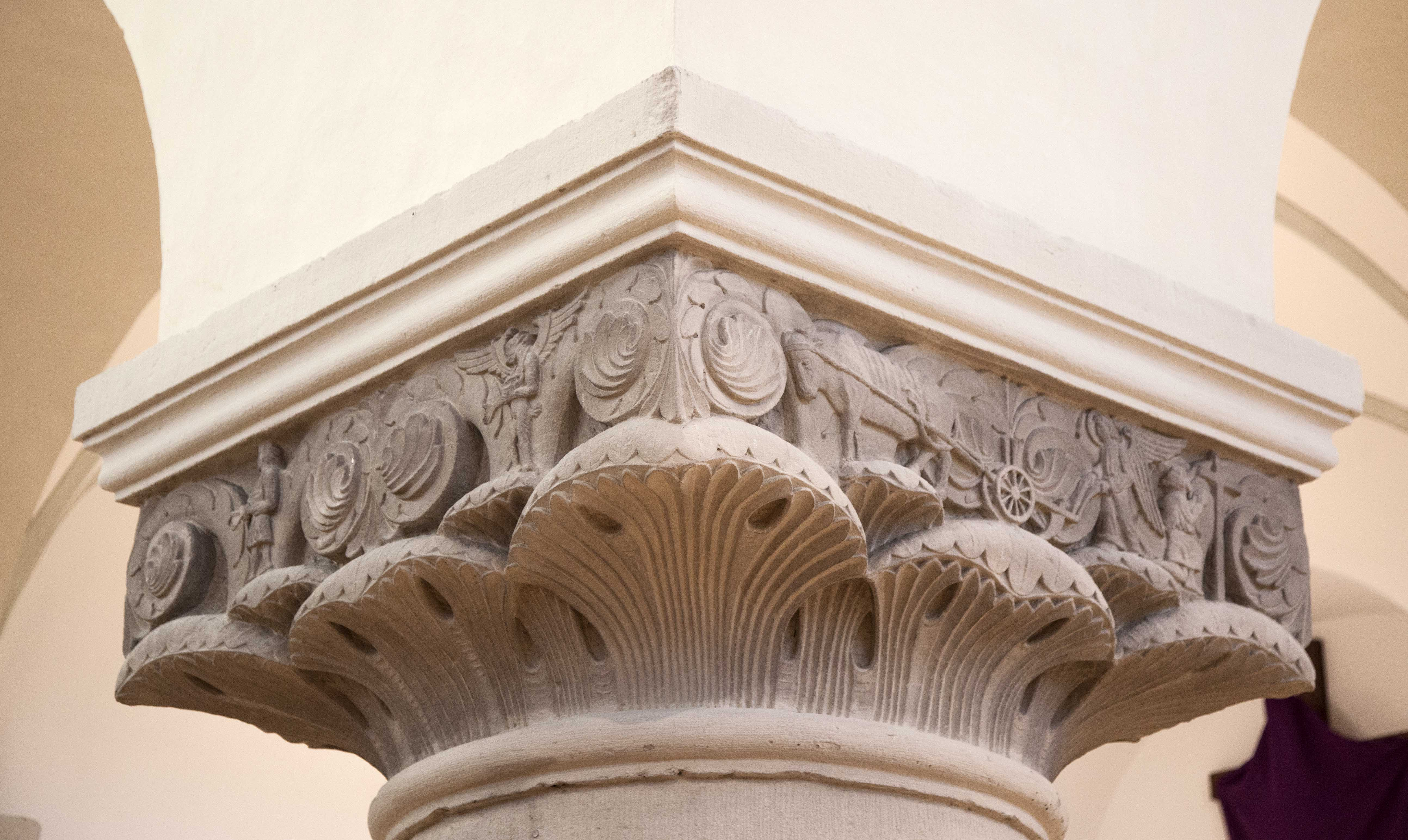 Kapitell - St. Maria Heimsuchung, Hauenhorst